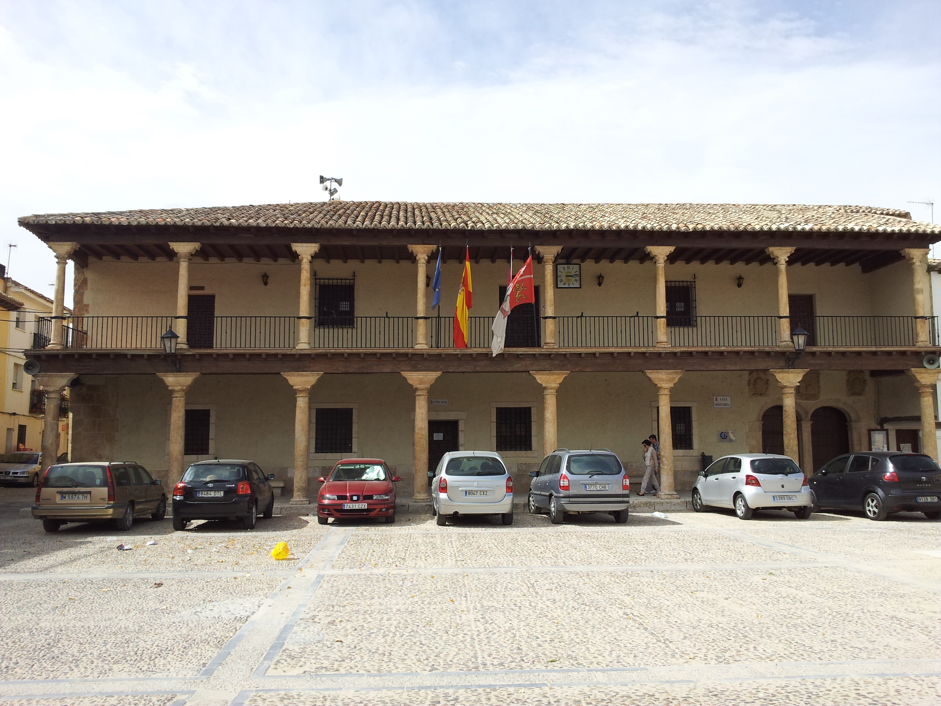 Ayuntamiento de Fuentelencina